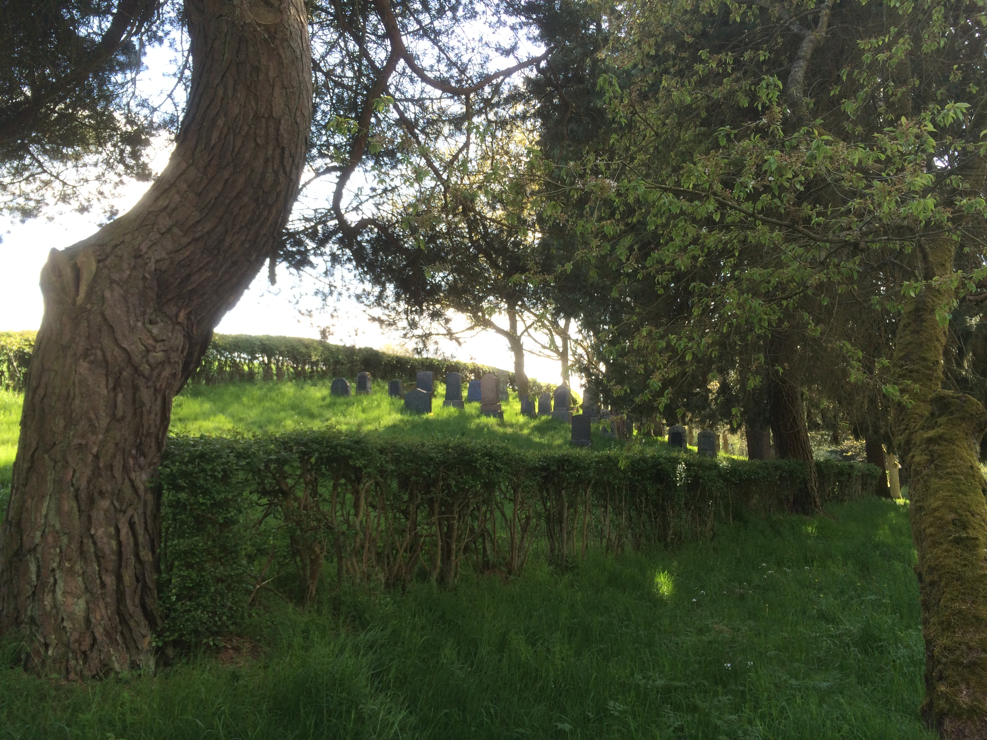 Denkmalzone Jüdischer Friedhof Rheinböllen - Nahansicht